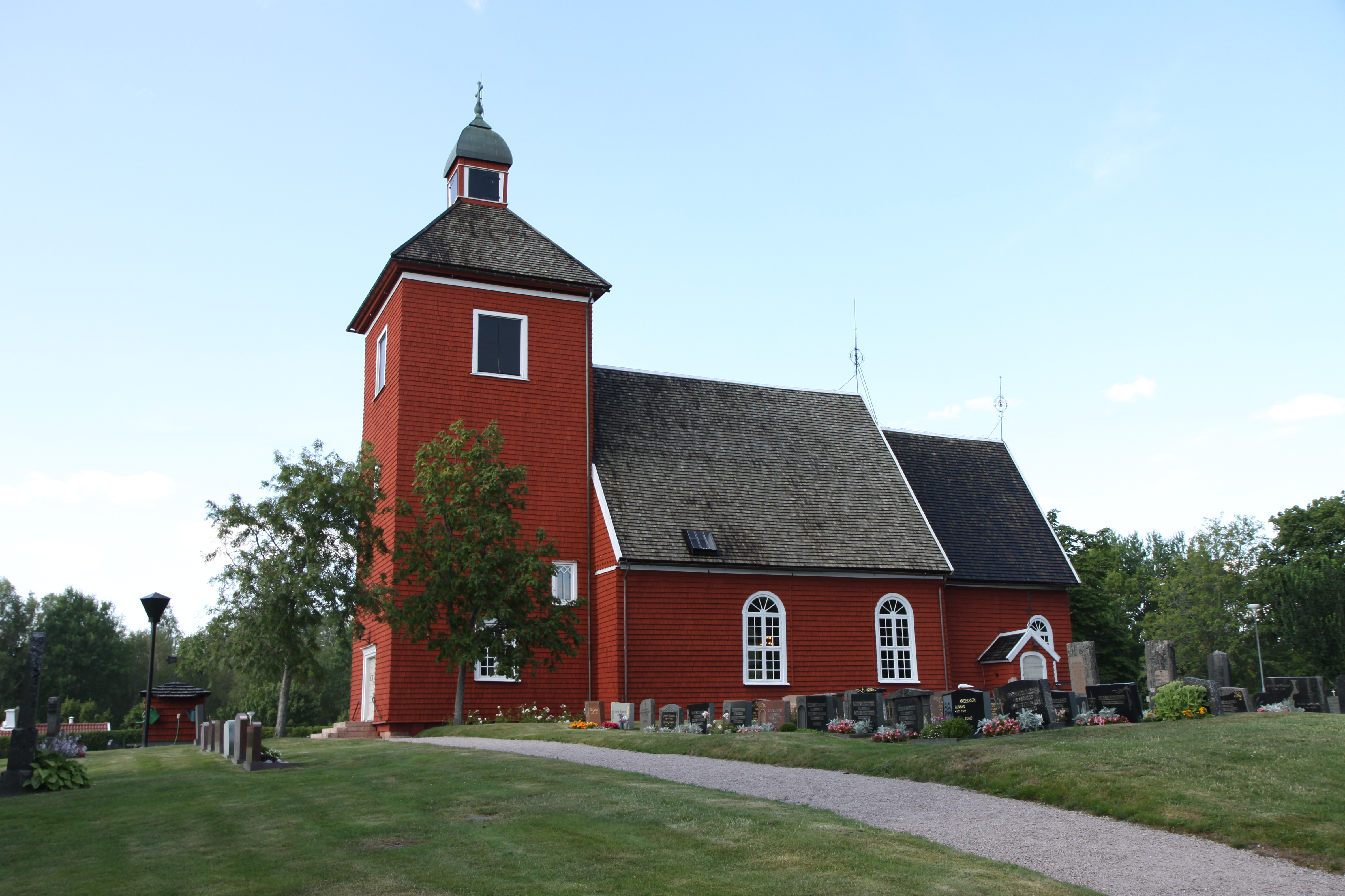 Mossebo kyrka